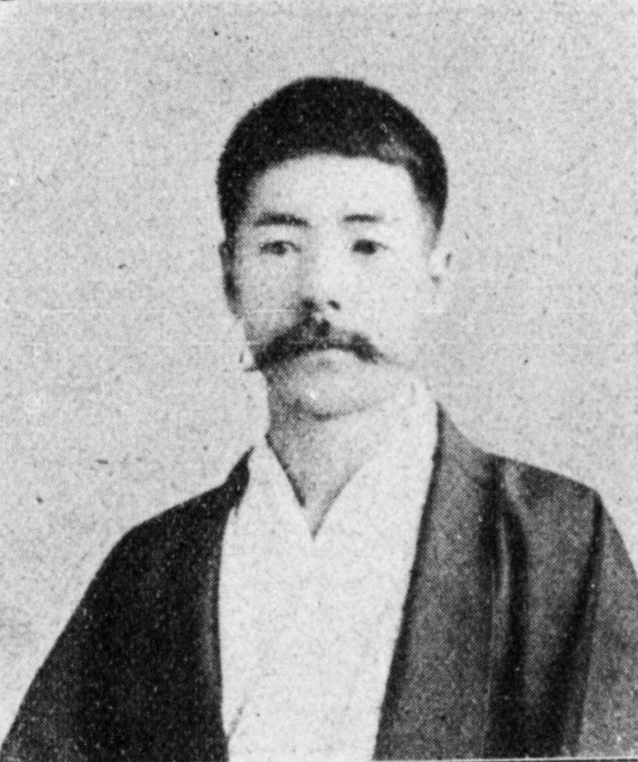 野上 嘉平